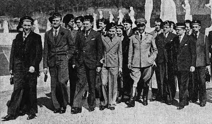 Groupe d'étudiants français portant la faluche en visite à Rome en 1935 traversant le stade des dieux de marbre au Forum Mussolini.